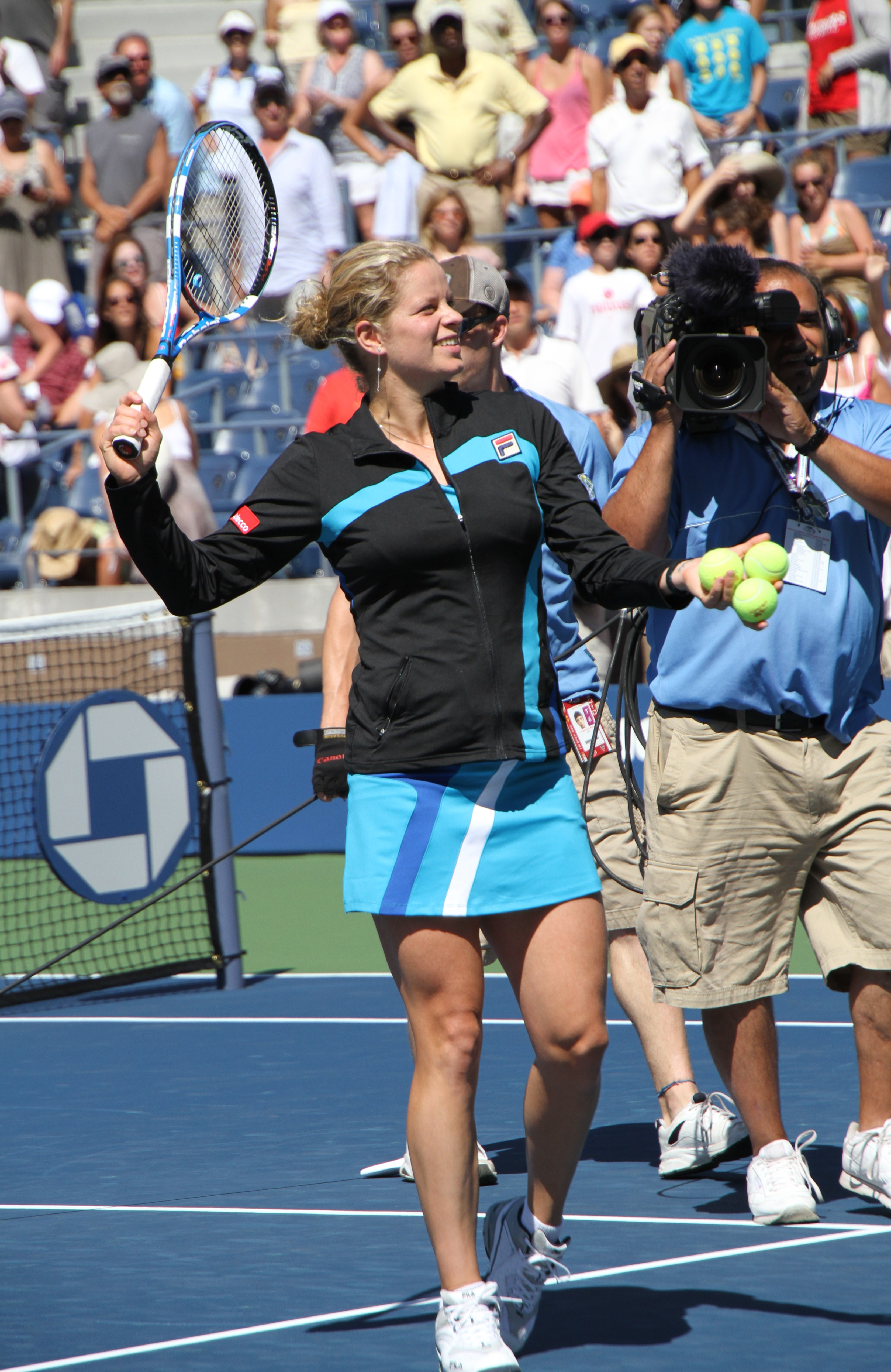 Kim Clijsters